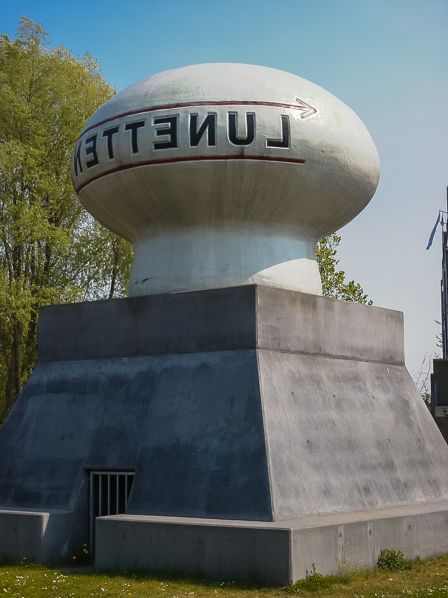 Kunstwerk bij de invalsweg van Lunetten, Simplonbaan/Stelviobaan/Lunettenbaan Utrecht